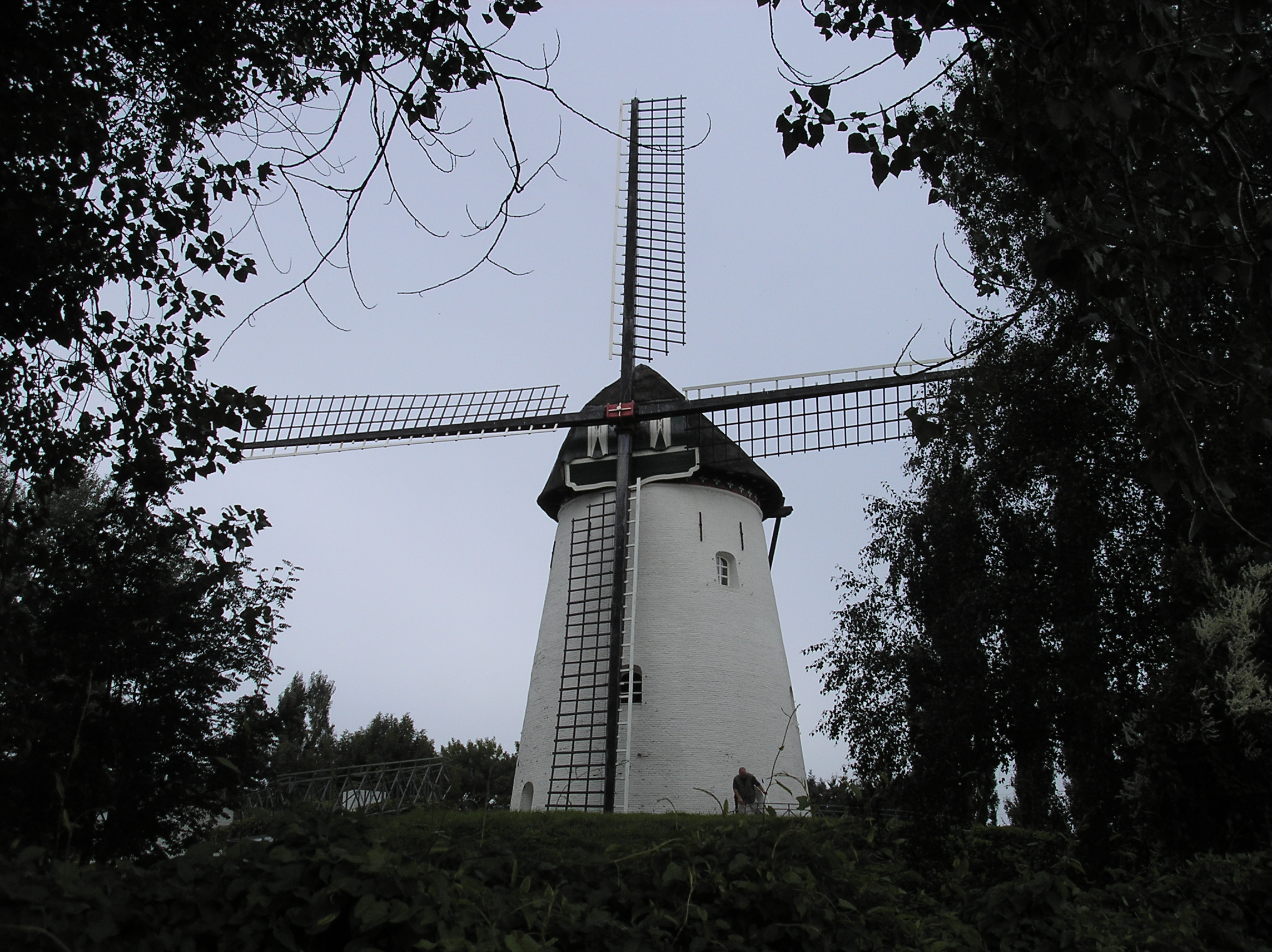 Mühle Keeken, Hofacker 43, Kleve-Keeken This is a photograph of an architectural monument.